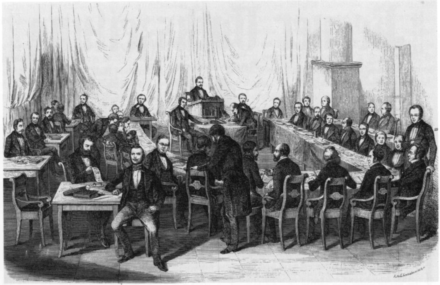 Letzte Sitzung der schweizerischen Tagsatzung am 20. Oktober 1847. Präsidiert von Ulrich Ochsenbein.